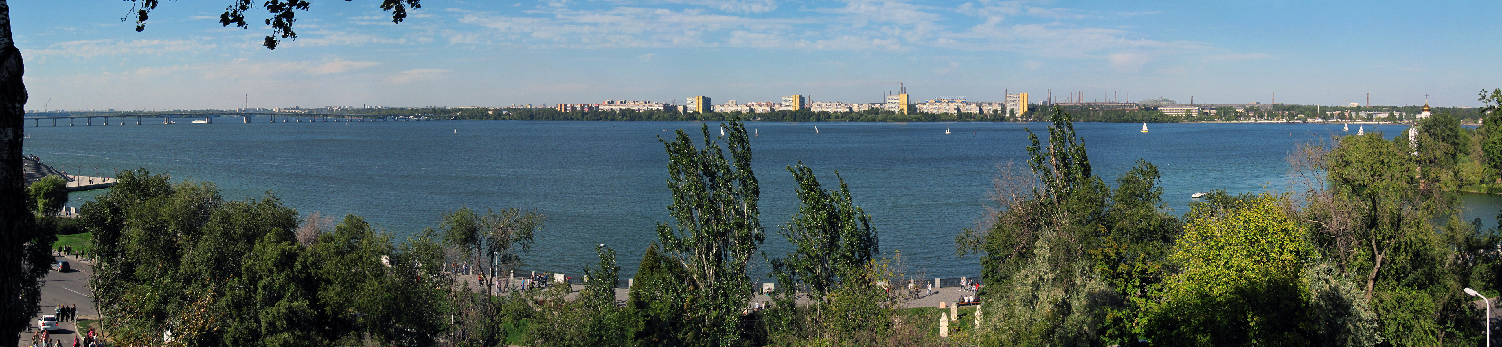 Панорама з оглядової площадки парку Шевченка